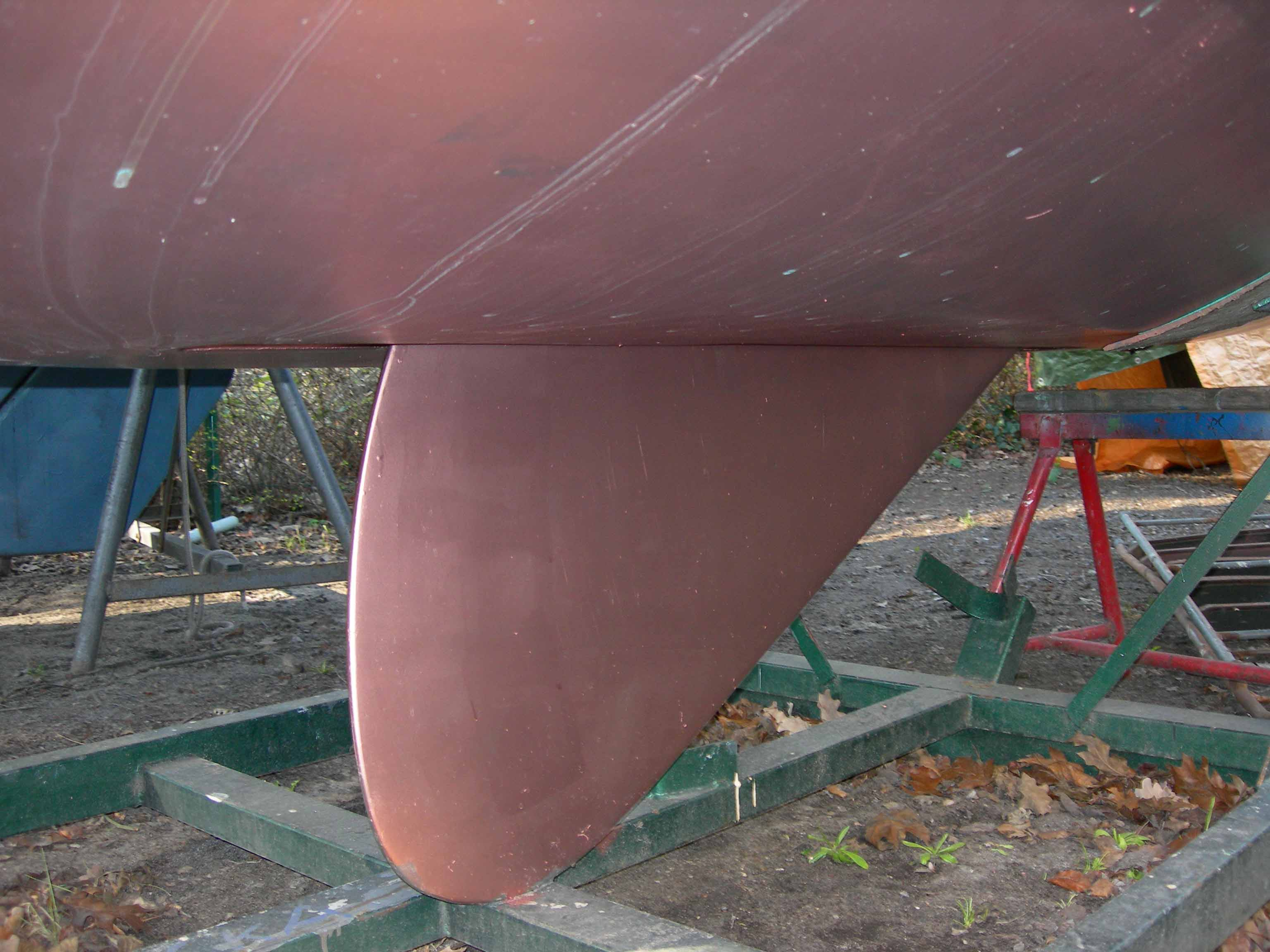 Ballastschwert einer Yacht